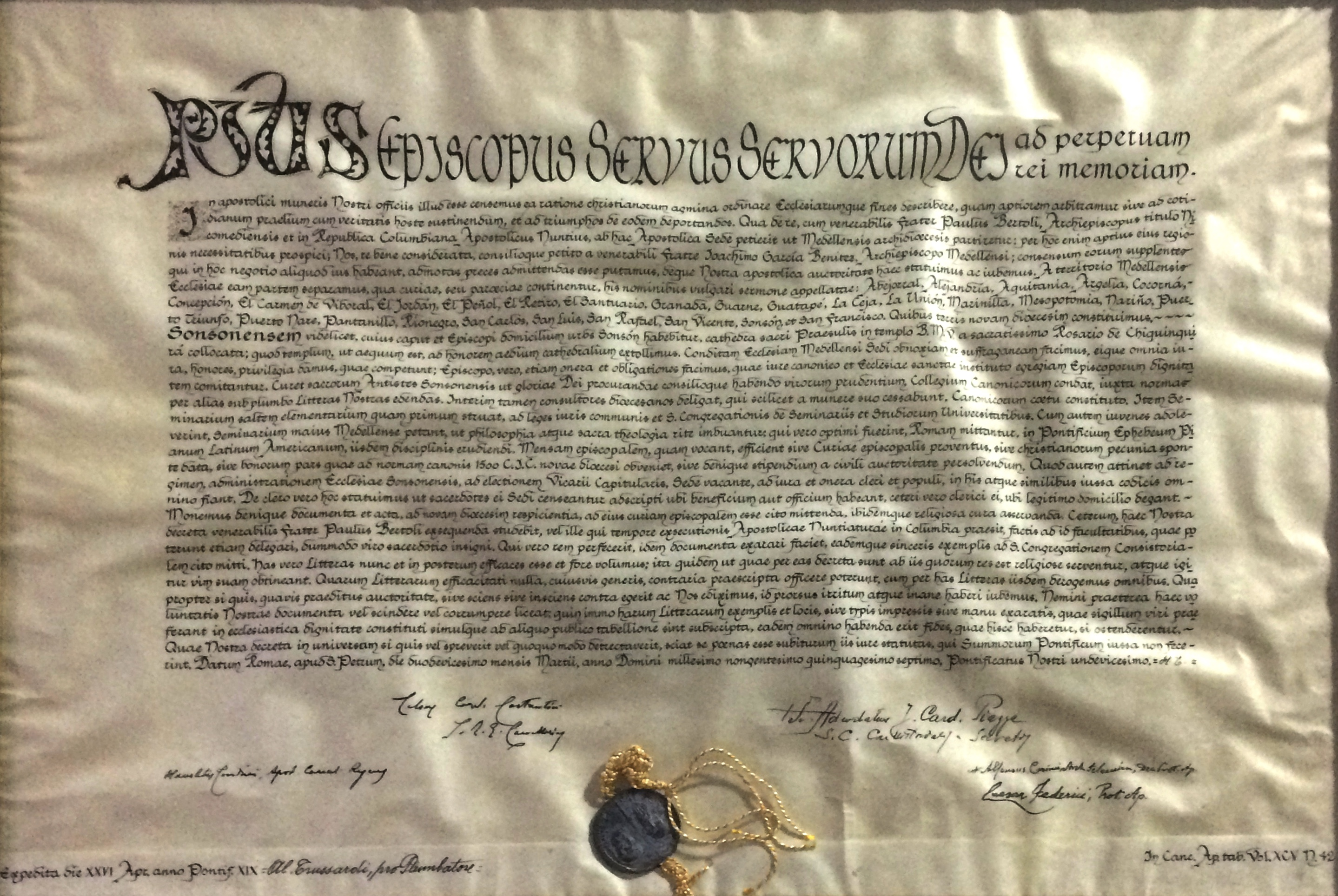 Bula papal "In apostolici muneris", mediante la cual se creó la Diócesis de Sonsón, exhibida en el Museo de Arte Religioso "Tiberio de J. Salazar y Herrera", de dicha capital diocesana.